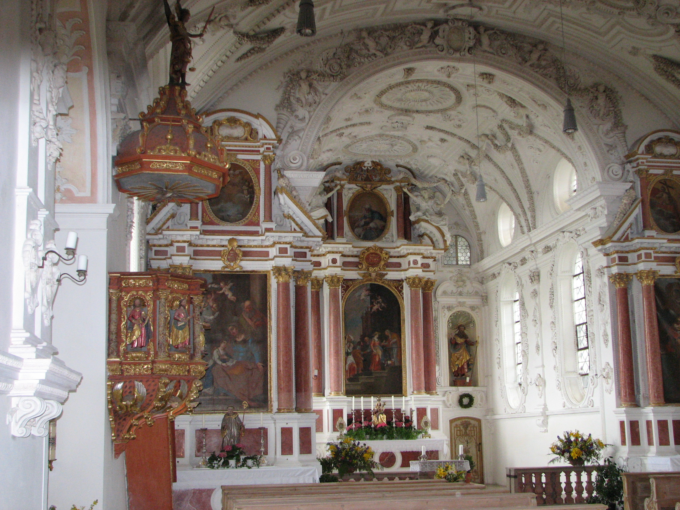 Eglise d'Ilgen, Bavière